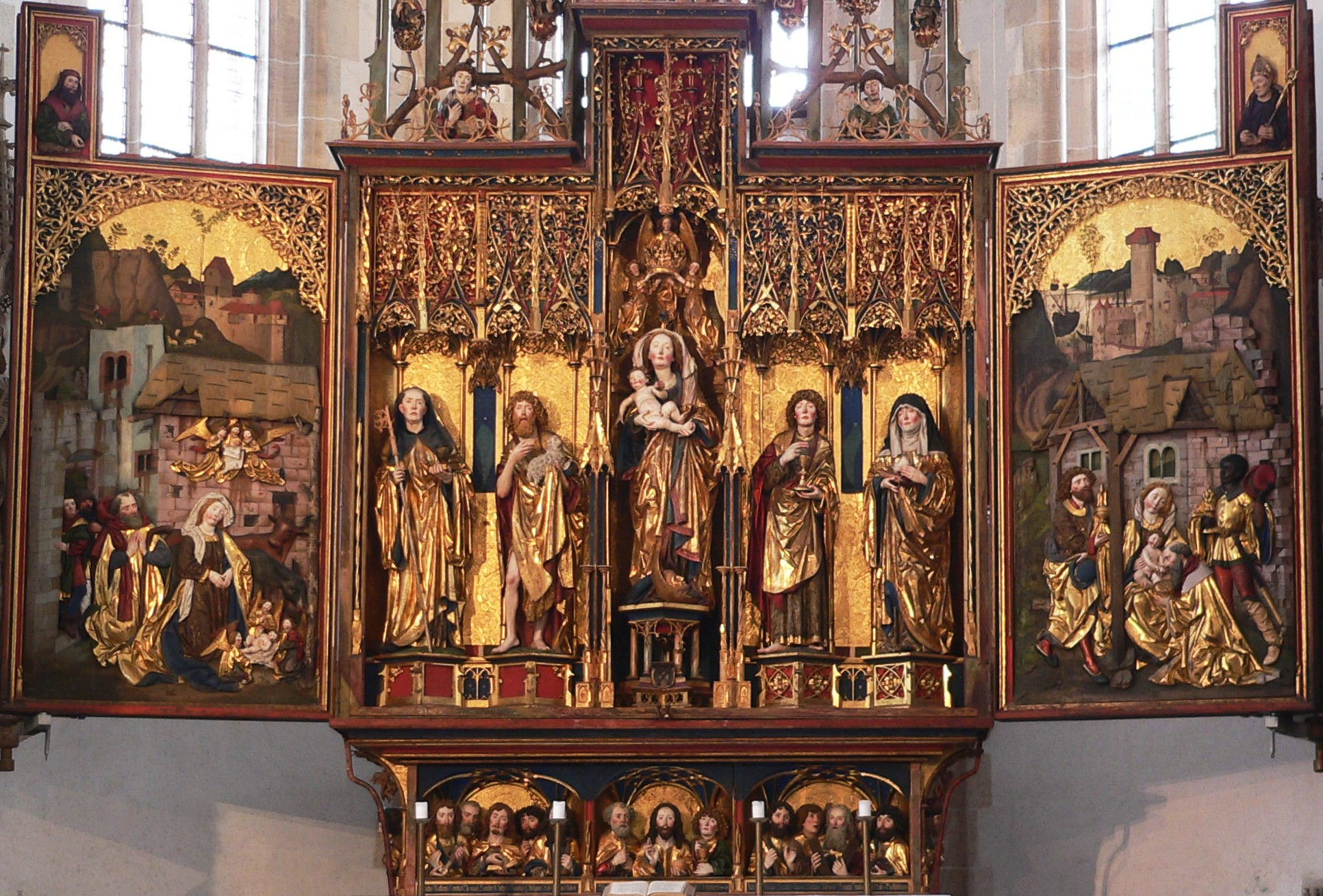 Kloster Blaubeuren, Klosterkirche, Hochaltar - Blaubeuren/Germany Gesamtansicht des geöffneten Schreins mit den zwei Innenflügeln Michel Erhart Alternative namesErhart, MichaelDate of birth/deathbetween circa 1440 and circa 1445after 1552Location of birth/deathUlm (?)Work locationUlmAuthority control VIAF: 45096461 LCCN: n83198675 GND: 118685147 ISNI: 0000 0000 8124 0348 WorldCat WP-Person